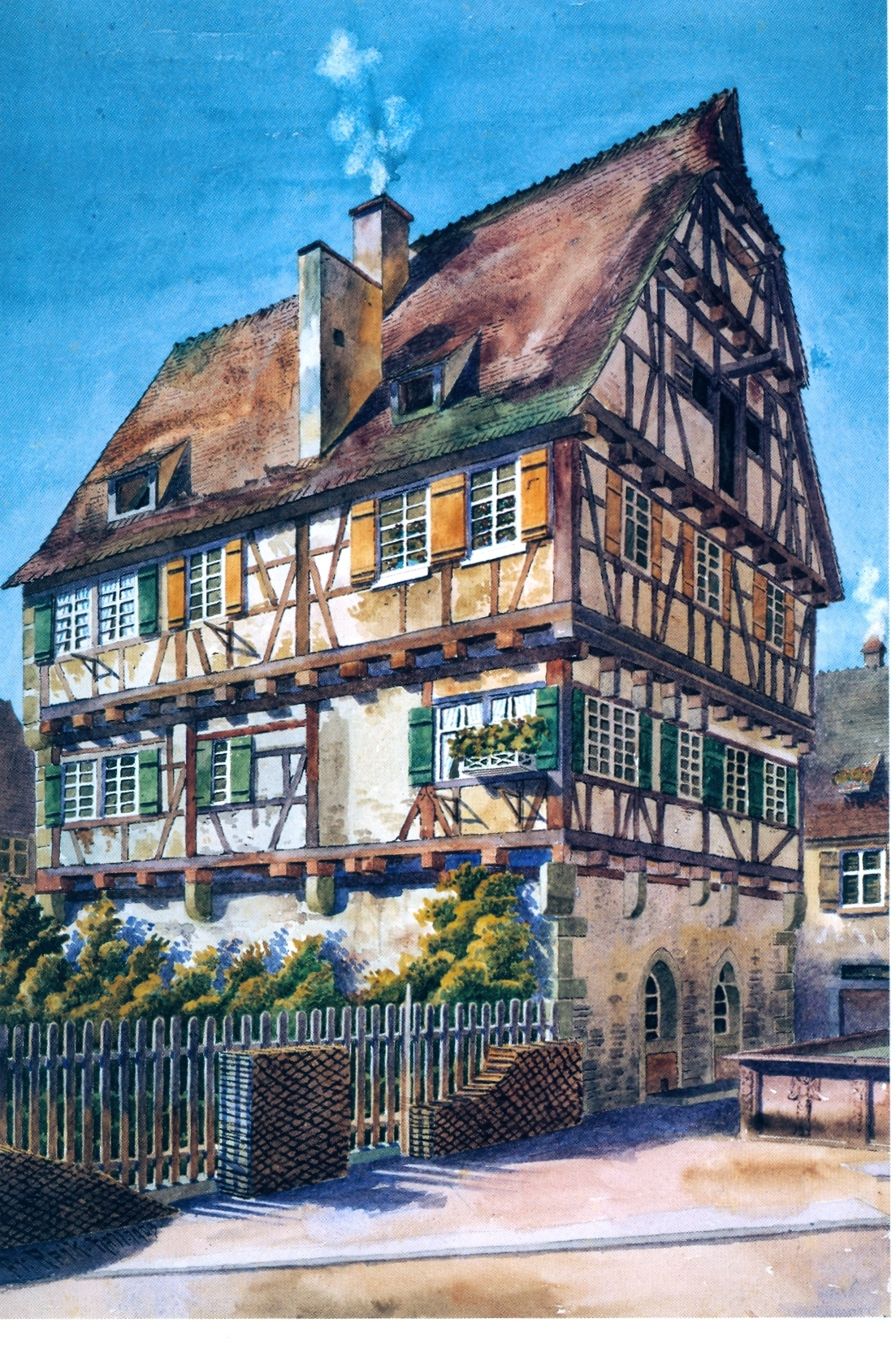 siehe oben